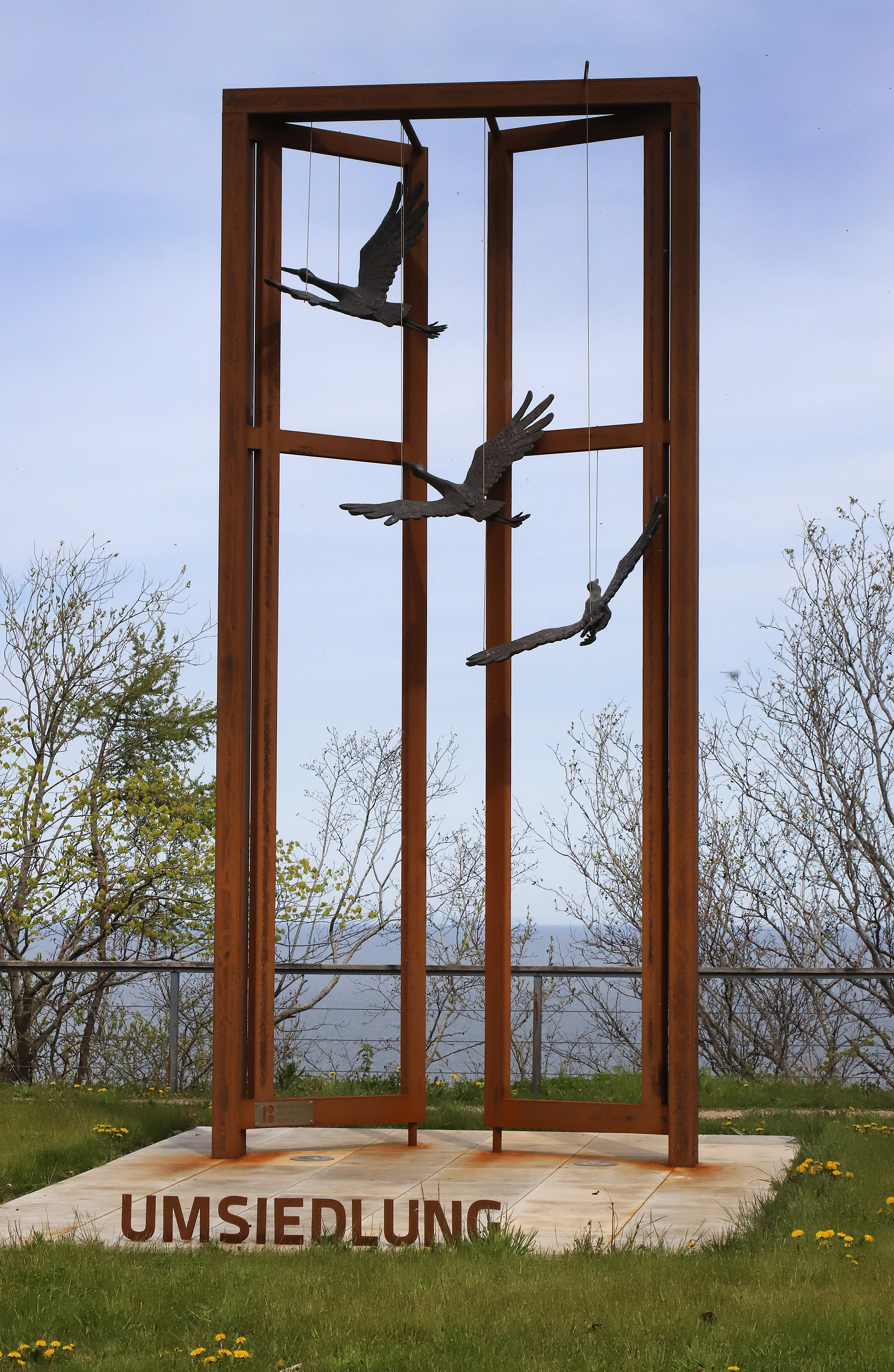 Saka mõisas baltisakslaste ümberasumise mälestusmärk 2020